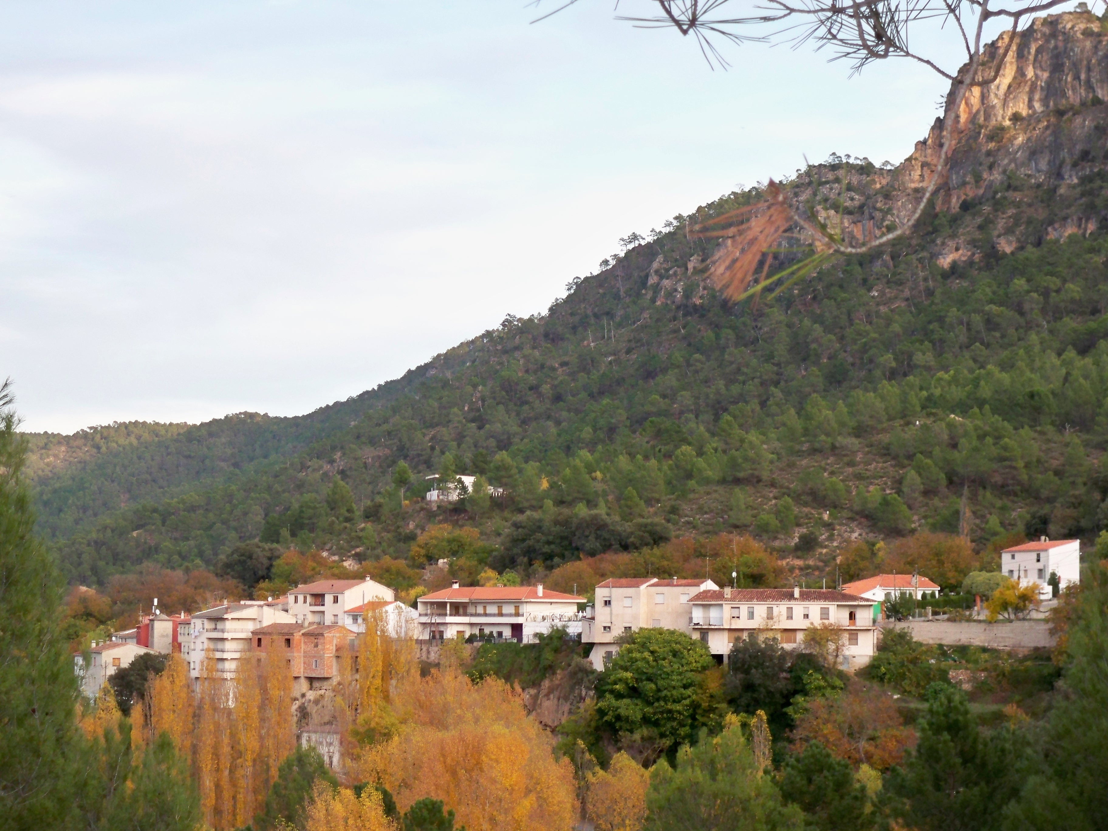 Fotografía panorámica de la aldea de Los Alejos (Molinicos - Albacete)